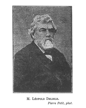 Léopold Delisle